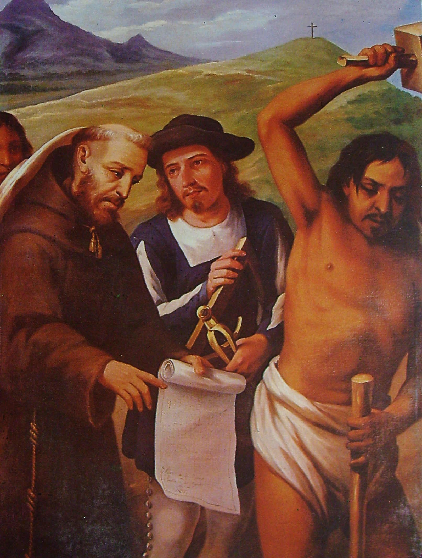 Cuadro que representa la Fundación de Puebla, que se conserva en el Palacio Municipal